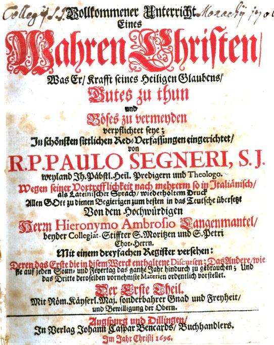 Hieronymus Ambrosius Langenmantel, Titelblatt eines von ihm übersetzten Buches von Pater Paolo Segneri